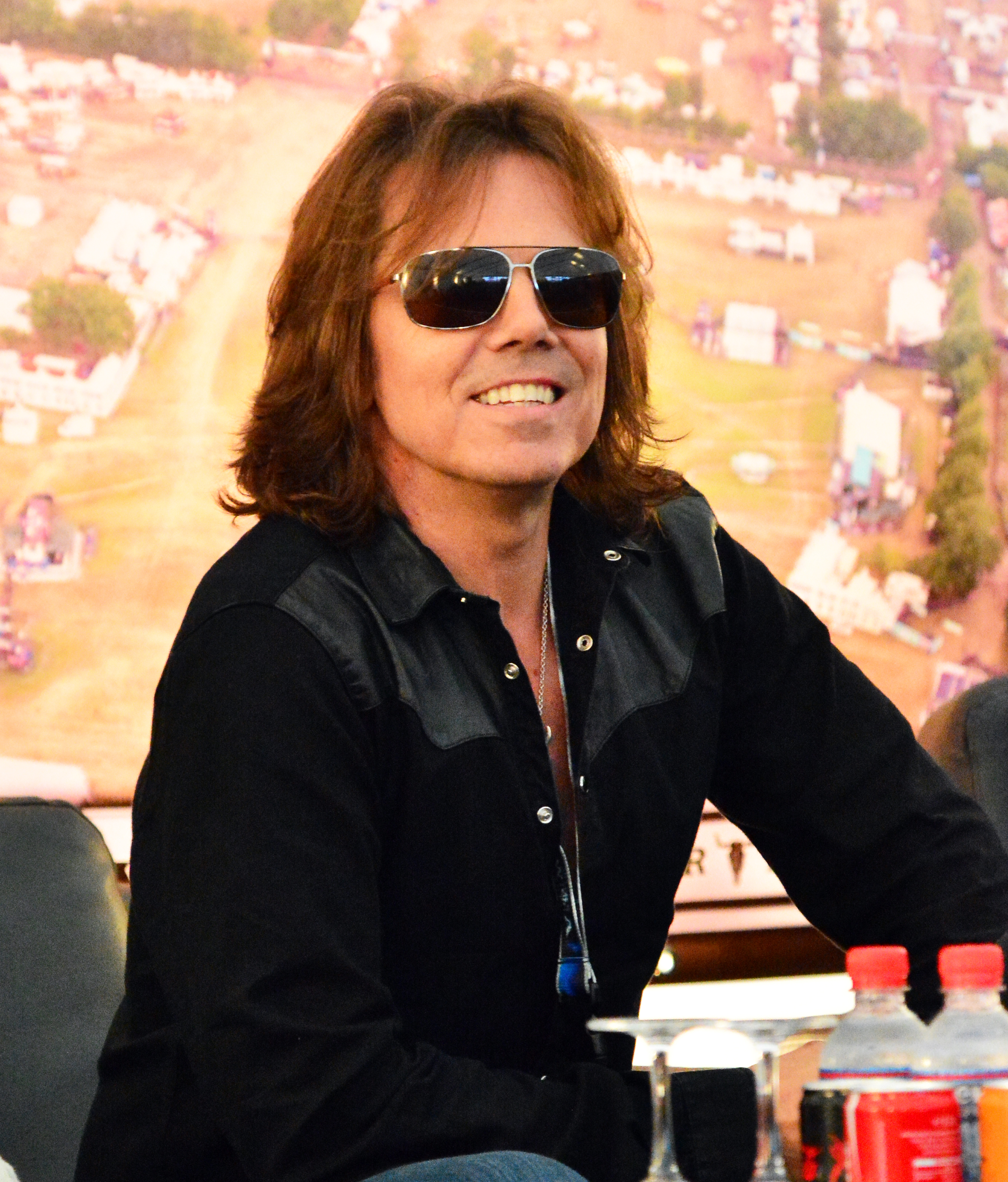 Joey Tempest von Europe bei der Pressekonferenz beim Wacken Open Air 2015